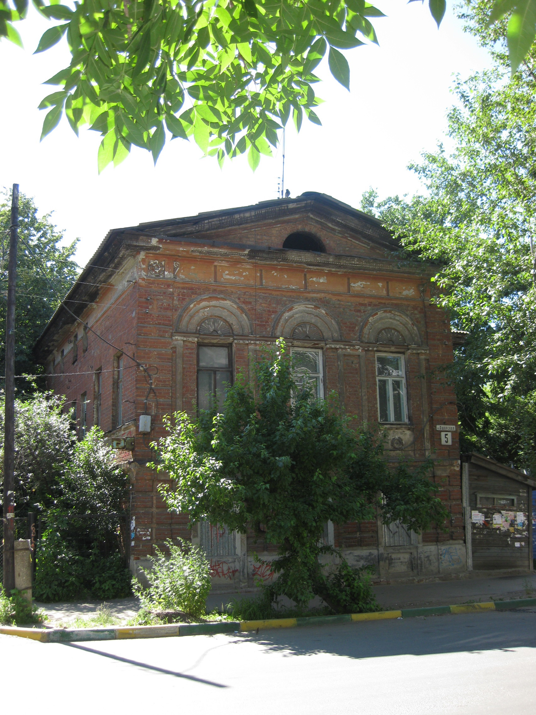 Дом П.Петровой (флигель жилой усадьбы П.Петровой): улица Ошарская, 5, Нижний Новгород, Нижегородская область